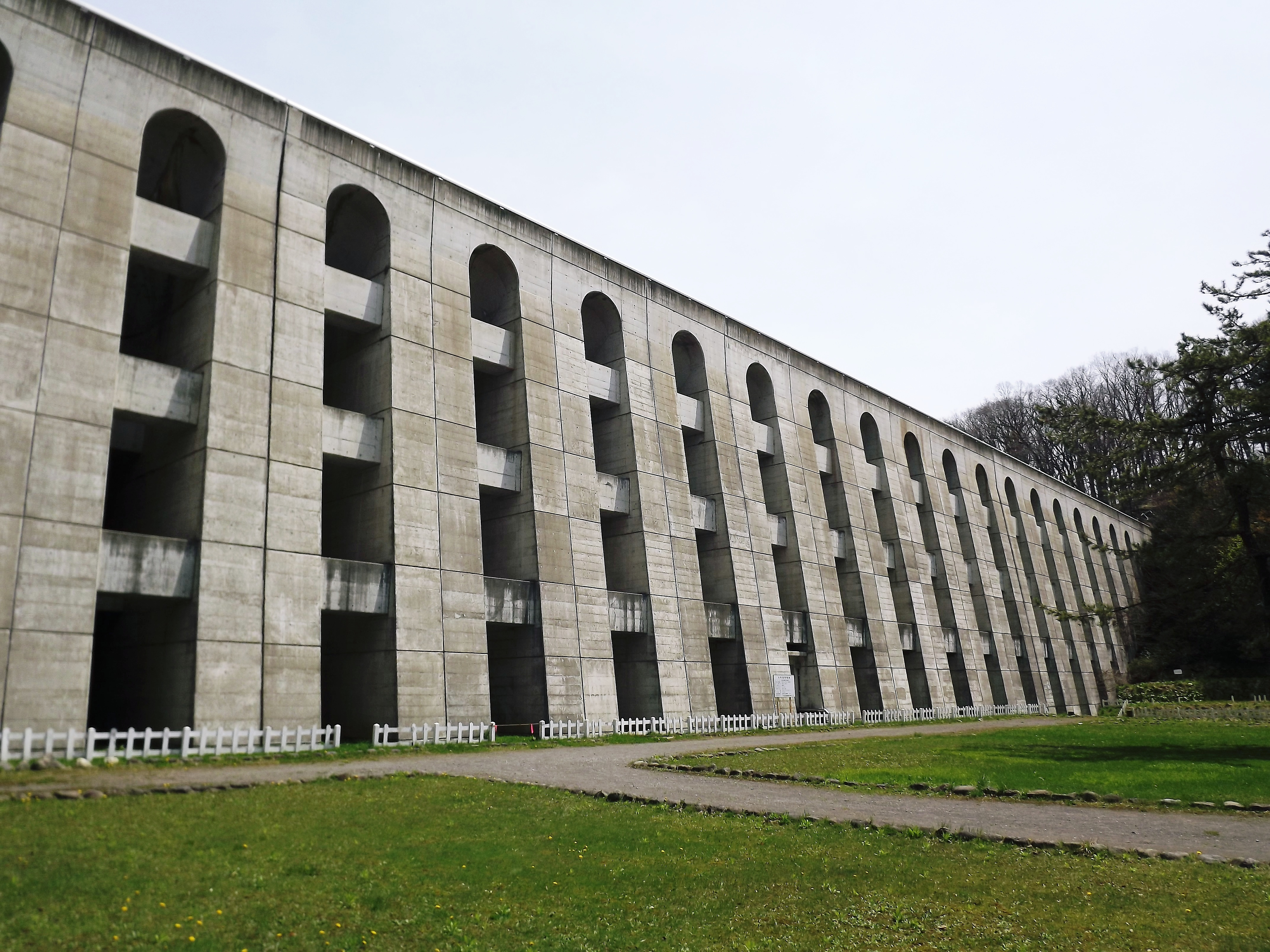 笹流ダム（笹流川・北海道。函館市水道部管理）